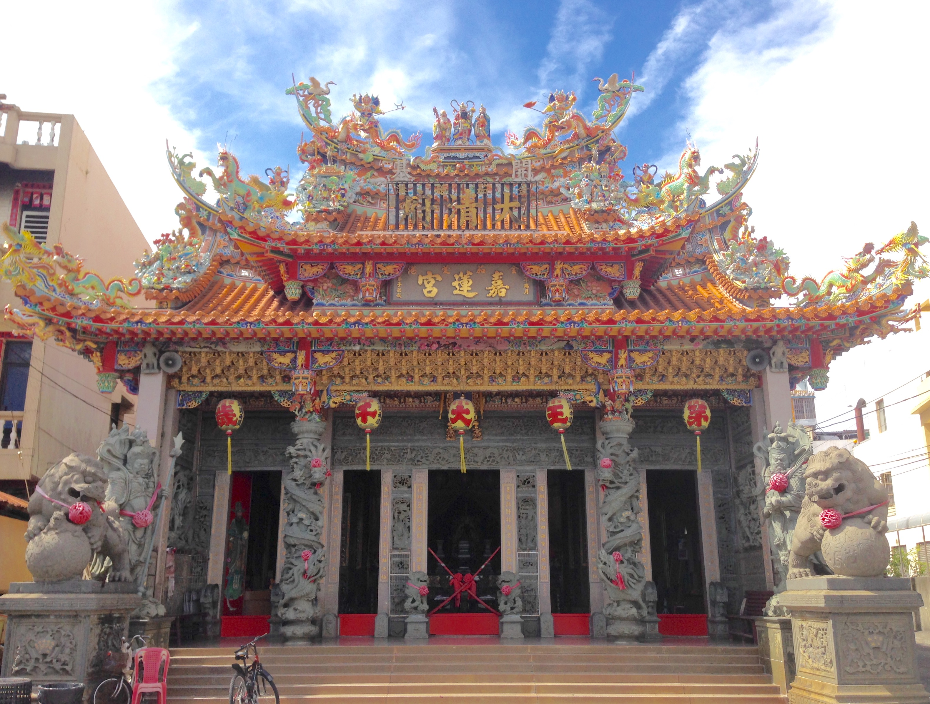 金茄萣嘉蓮宮